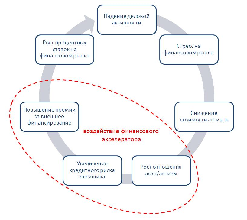 Иллюстрация финансового акселератора